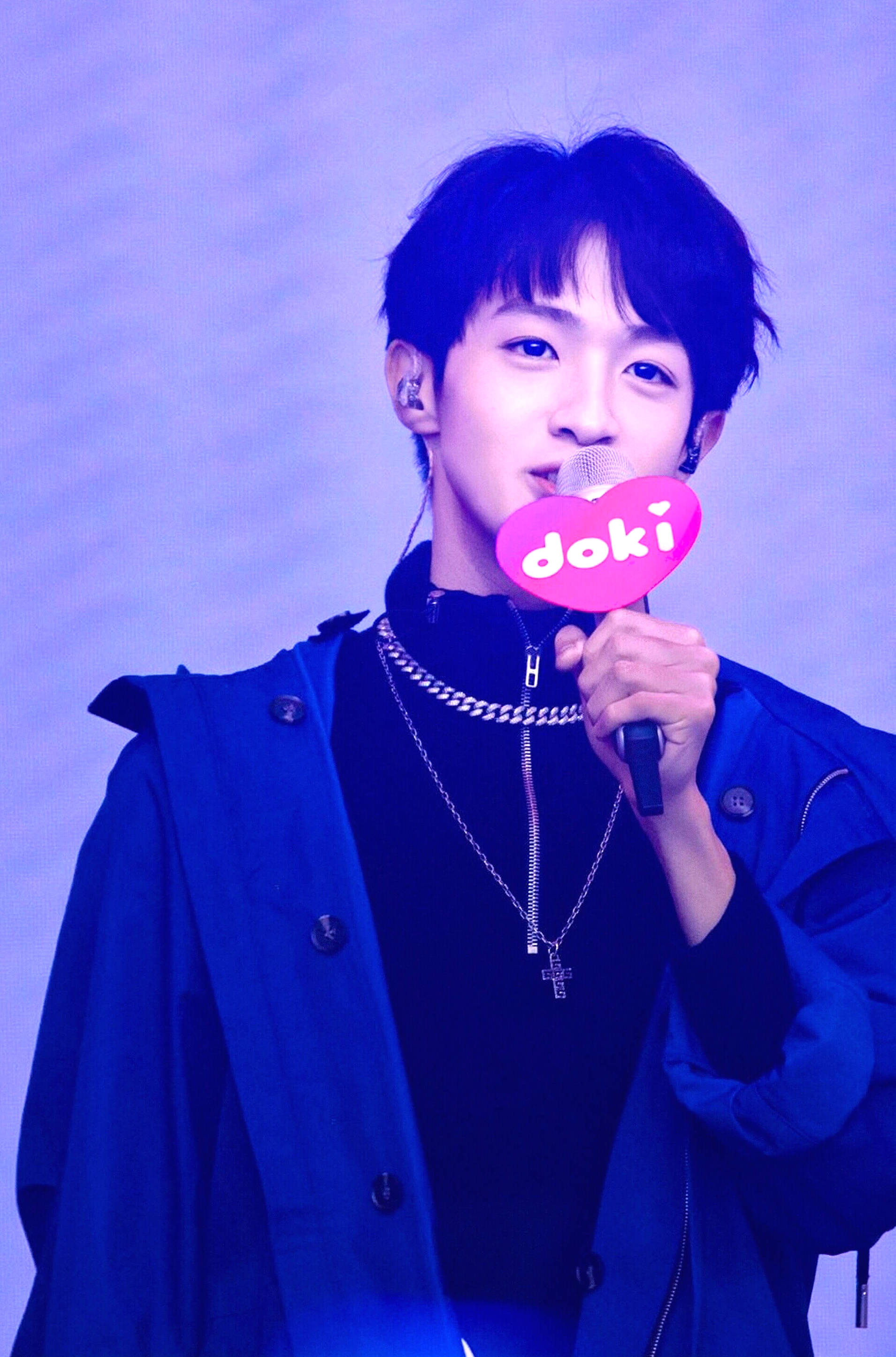 Ngô Quý Phong hát mở màn sự kiện 2019doki